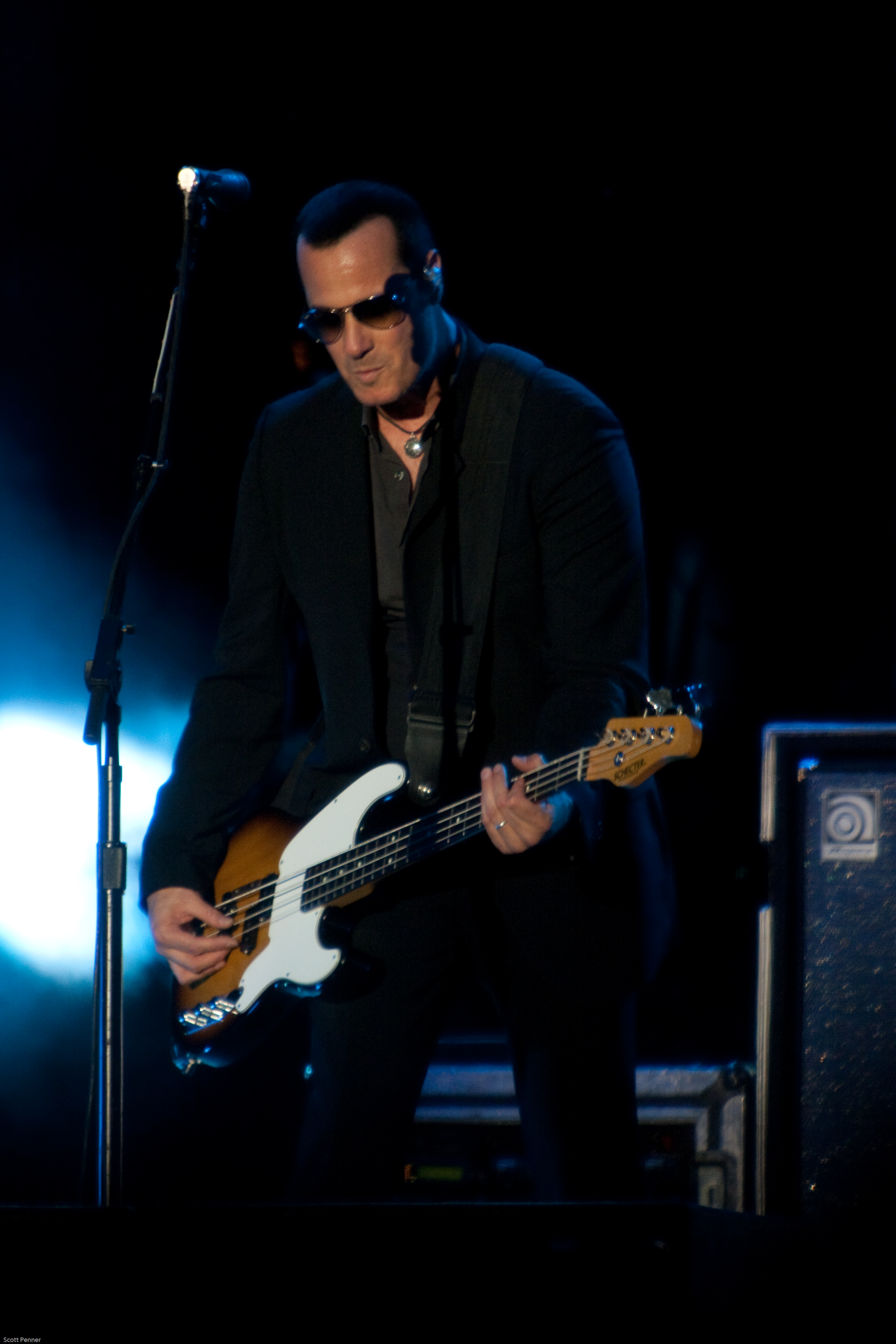 Description Роберт ДеЛео на Bluesfest 2009 Date13 июля 2012Source Penner Роберт ДеЛео на Bluesfest 2009